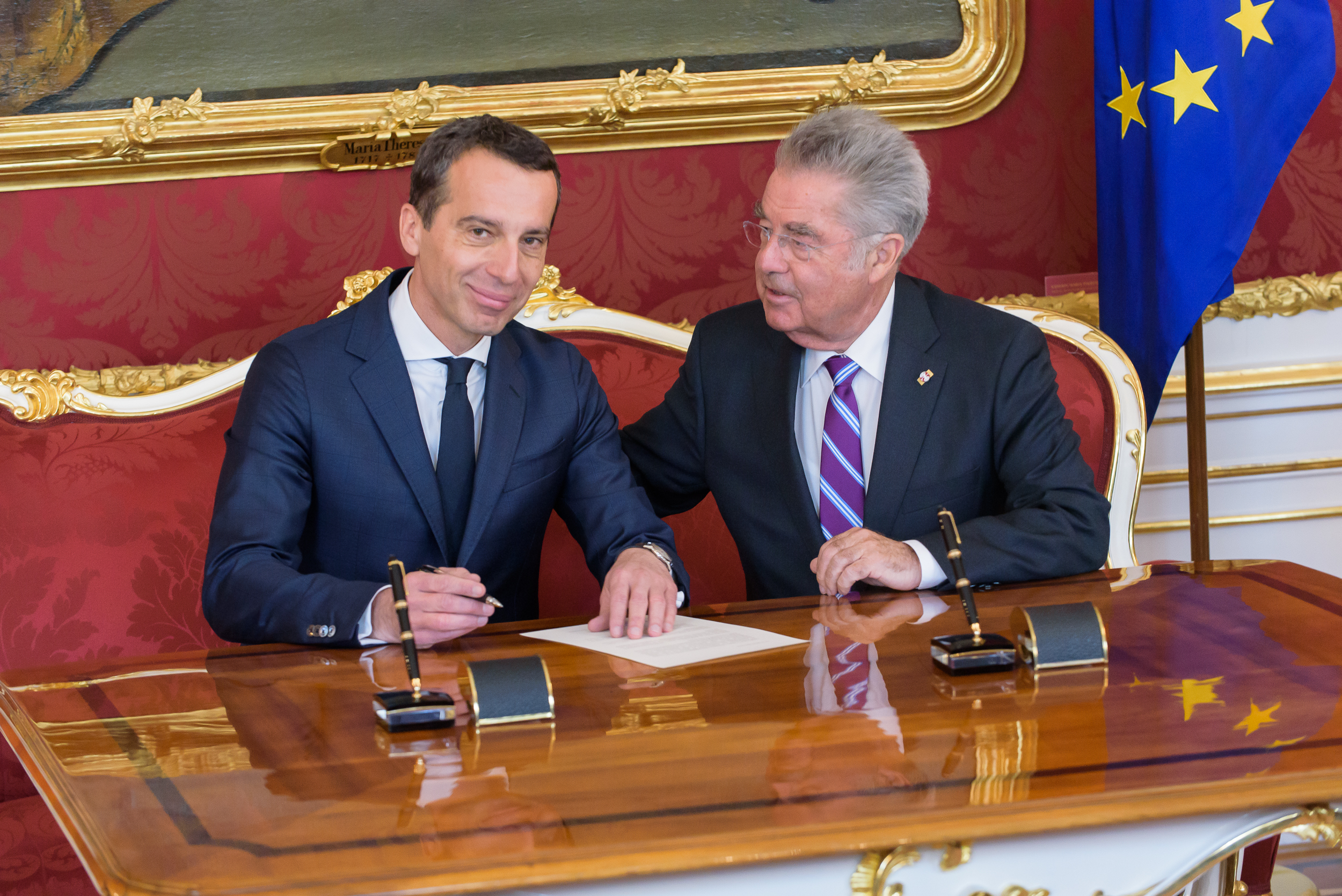 Bundeskanzler Christian Kern und Bundespräsident Heinz Fischer bei der Angelobung der neuen Regierungsmitglieder Thomas Drozda, Muna Duzdar, Sonja Hammerschmid, und Jörg Leichtfried